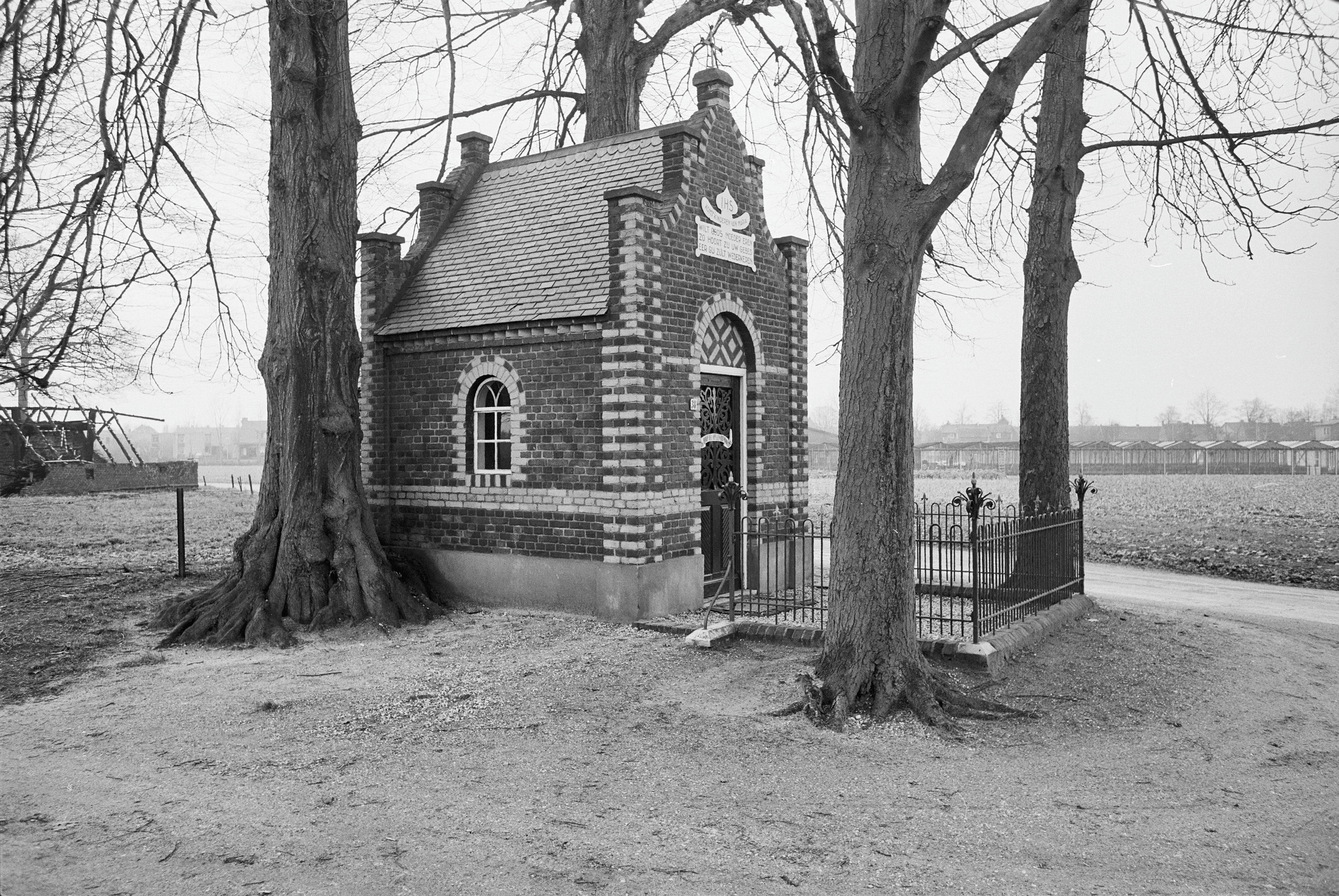 kapel